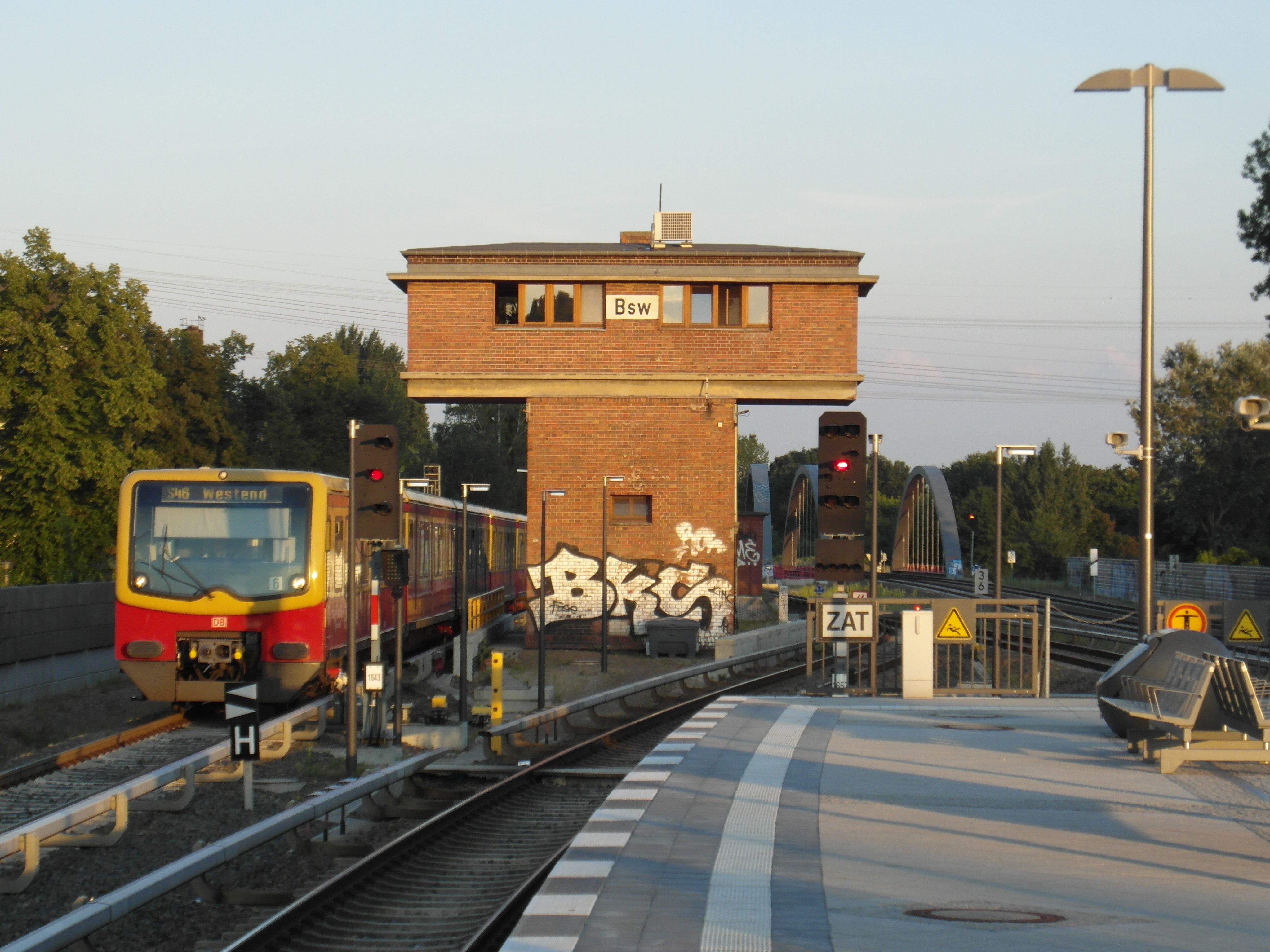 Bahnhof Berlin Baumschulenweg, Stellwerk Bsw